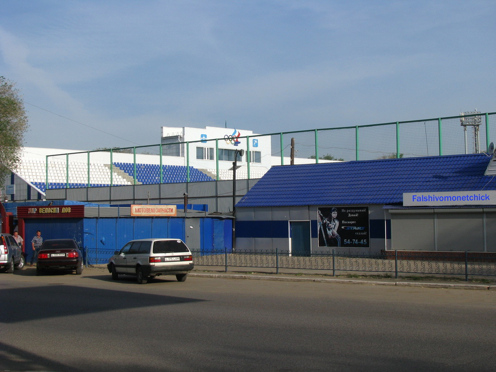 Стадион имени Петра Атояна в городе Уральск